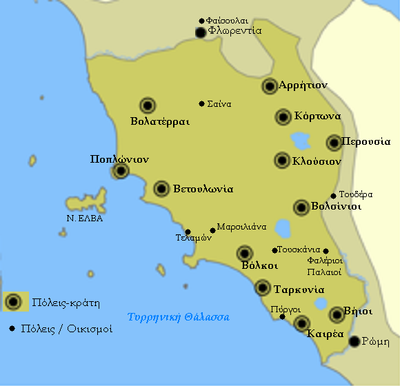 Χάρτης της Ετρουρίας